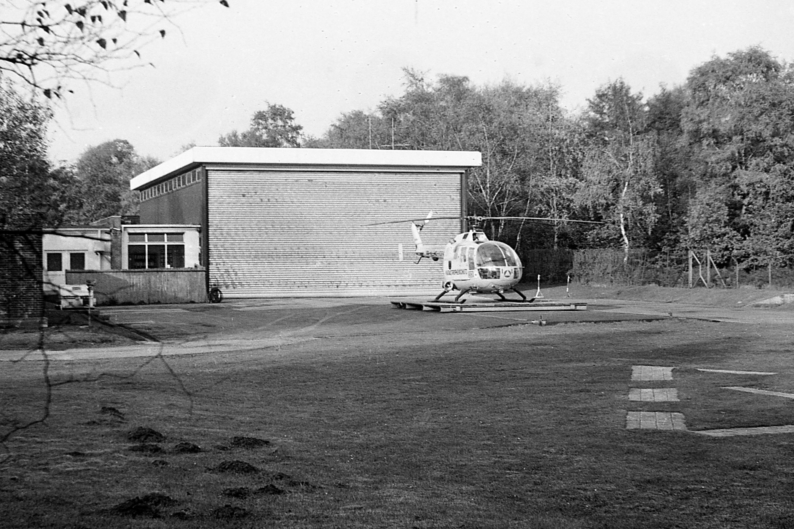 Christoph 9 an seinem Standort am BGU Duisburg-Buchholz, ca. 1978